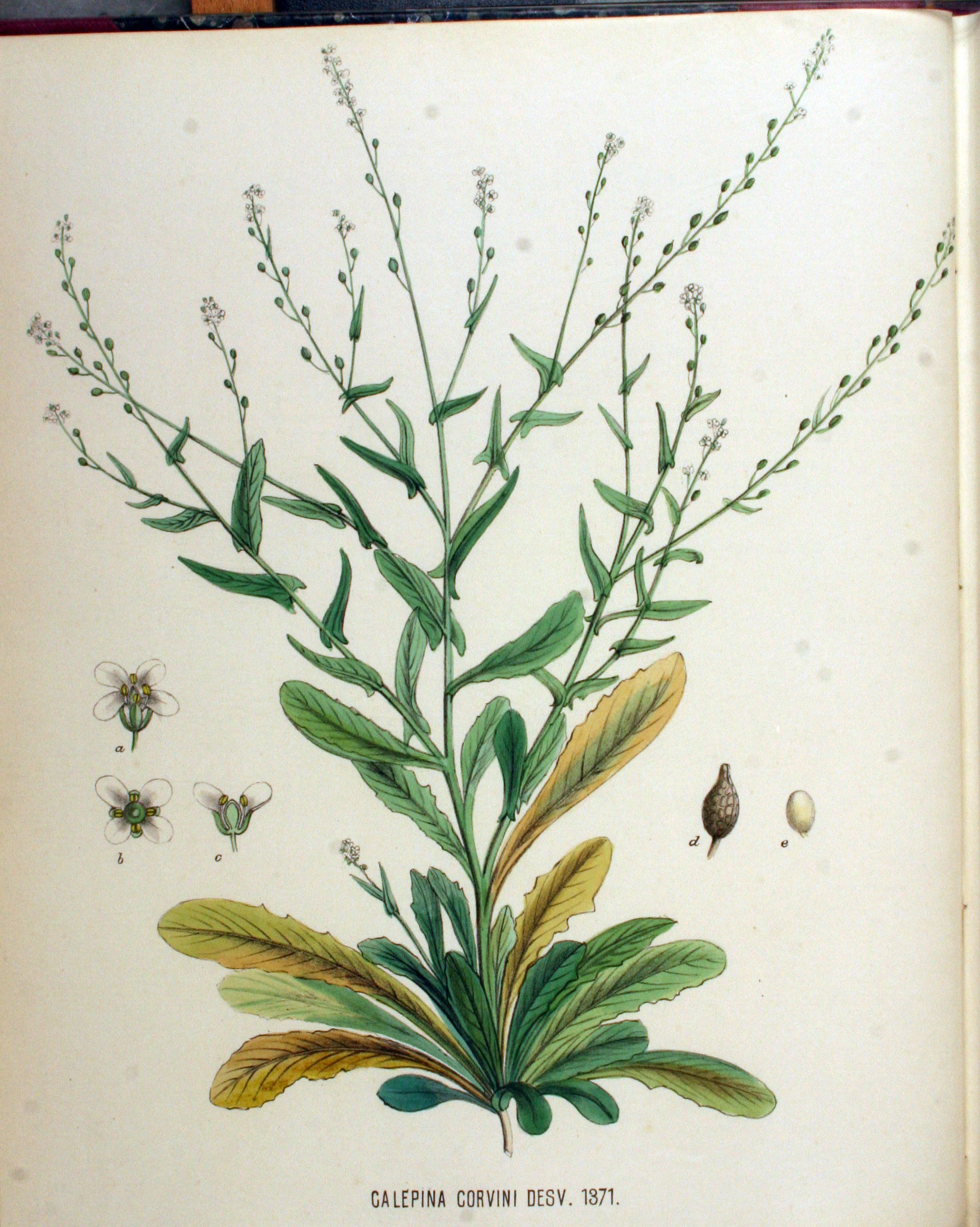 Celepina irregularis (Asso) Thell. (Syn. Calepina corvini (All.) Desv.)